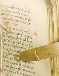 Sachsenspiegel-Handschrift von 1385 (Schwesterhandschrift des Harffer Sachsenspiegels), Fotografiert von Britta Lauer